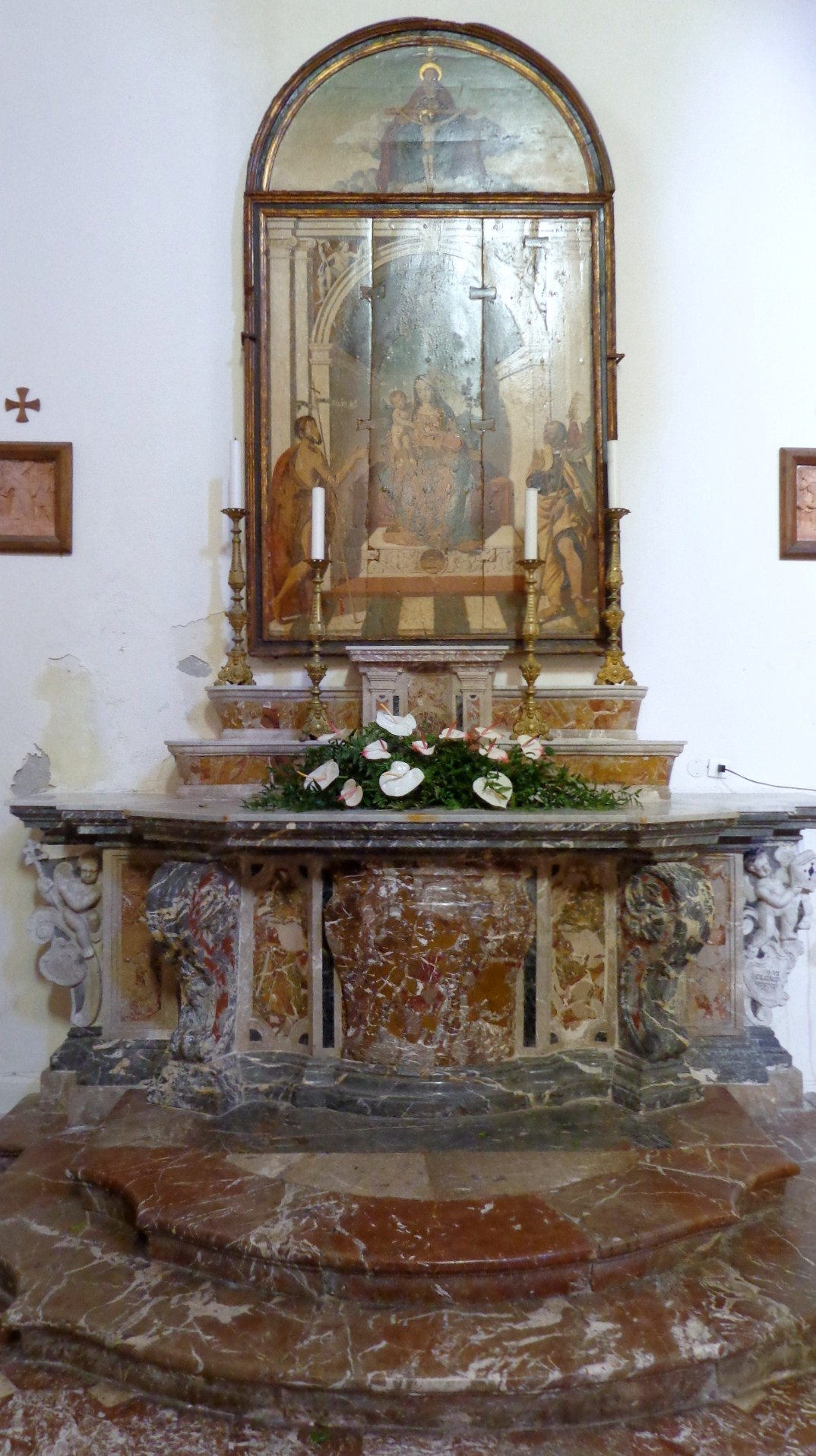 Altare